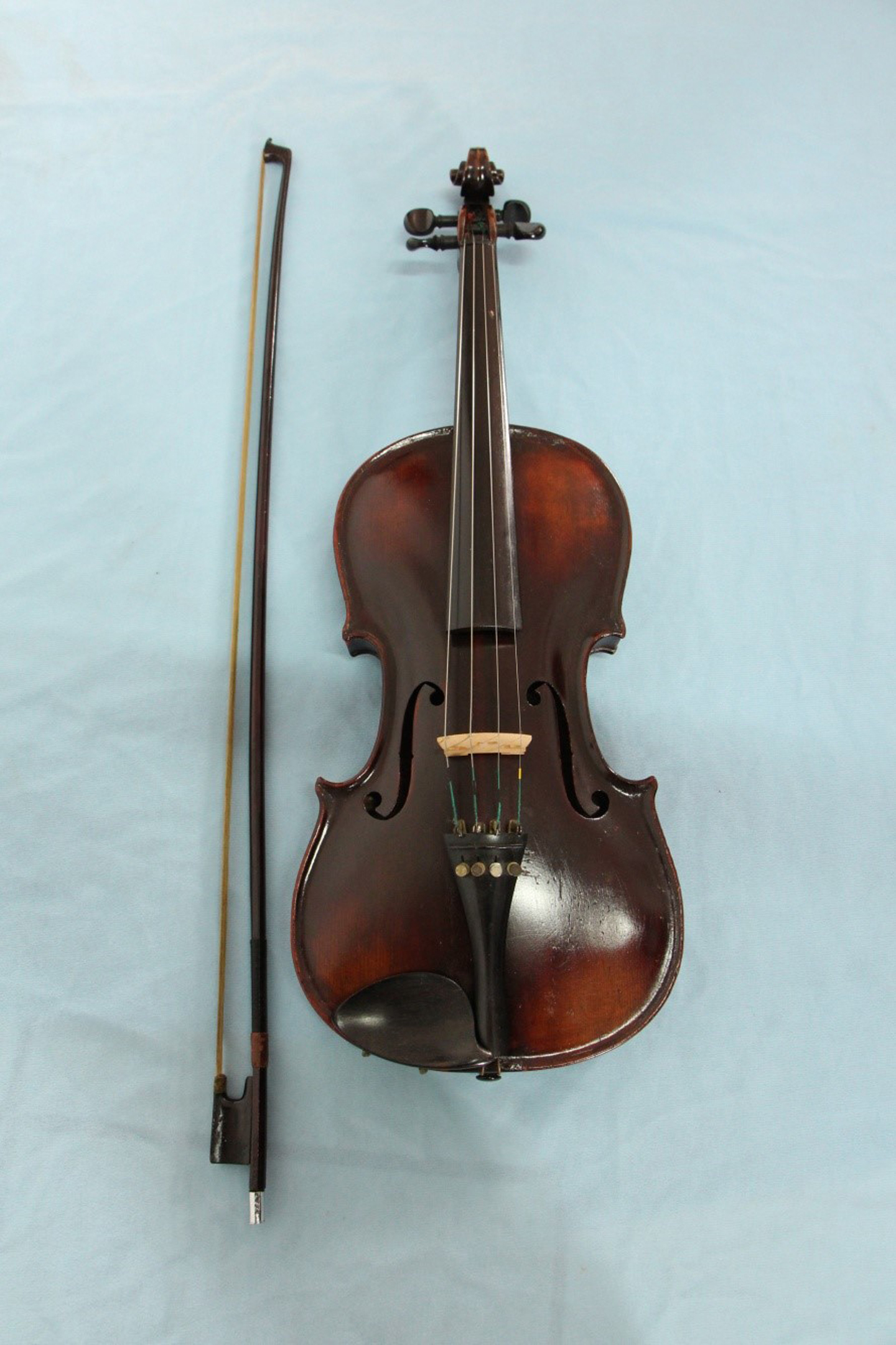 Biola WR Supratman yang digunakan untuk mengiringi lagu kebangsaan Indonesia pertama kali dikumandangkan.